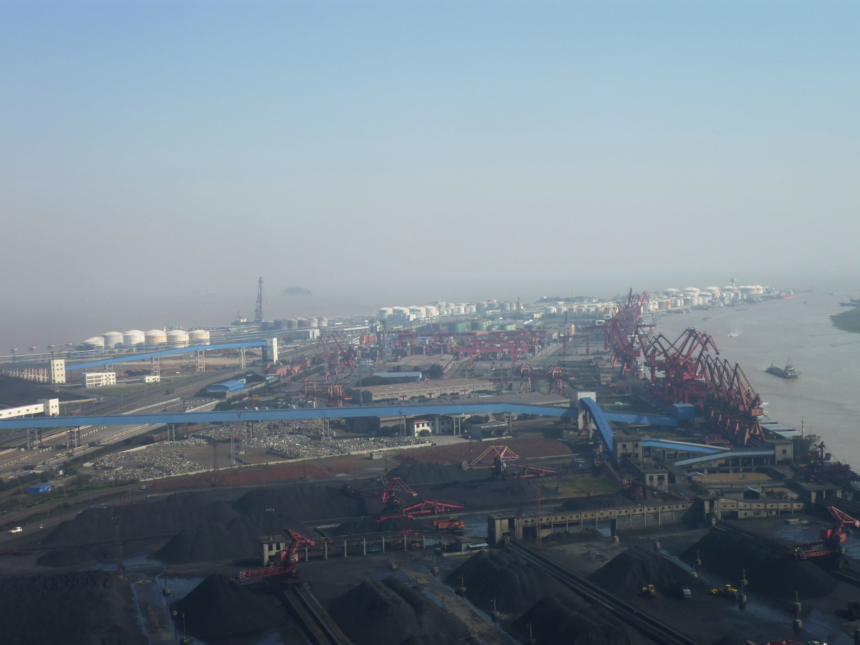 镇海煤炭码头